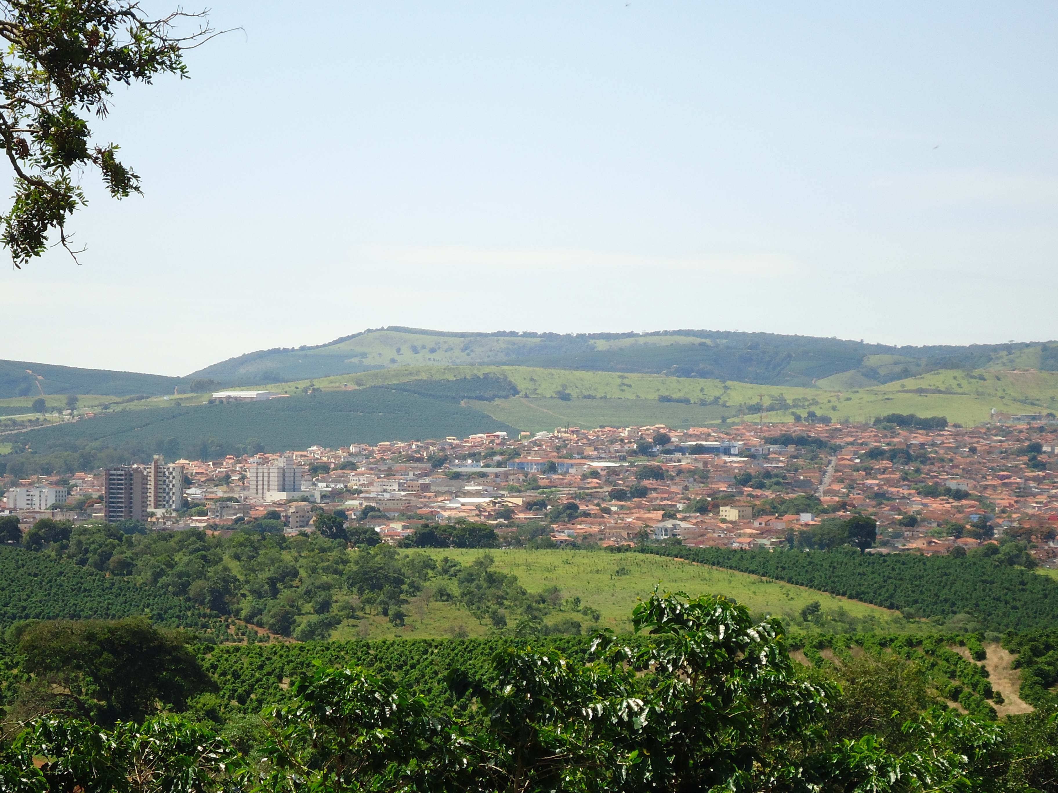 A cidade de Três Pontas vista de longe.